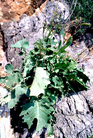 Sicilian botanical endemismsBrassica macrocarpa